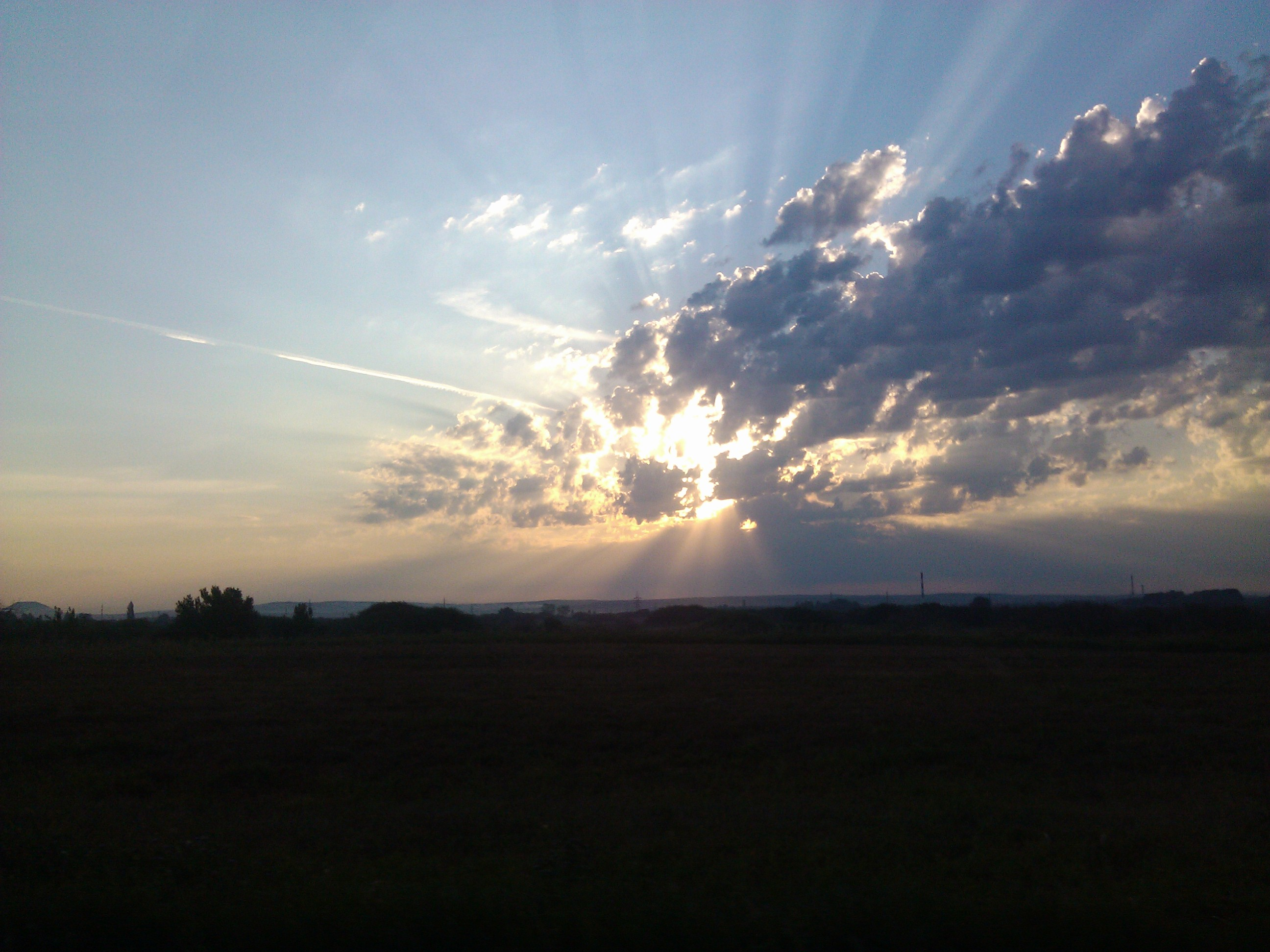 Рассвет 6.08.2012